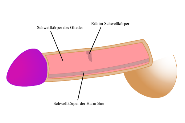 Penisbruch